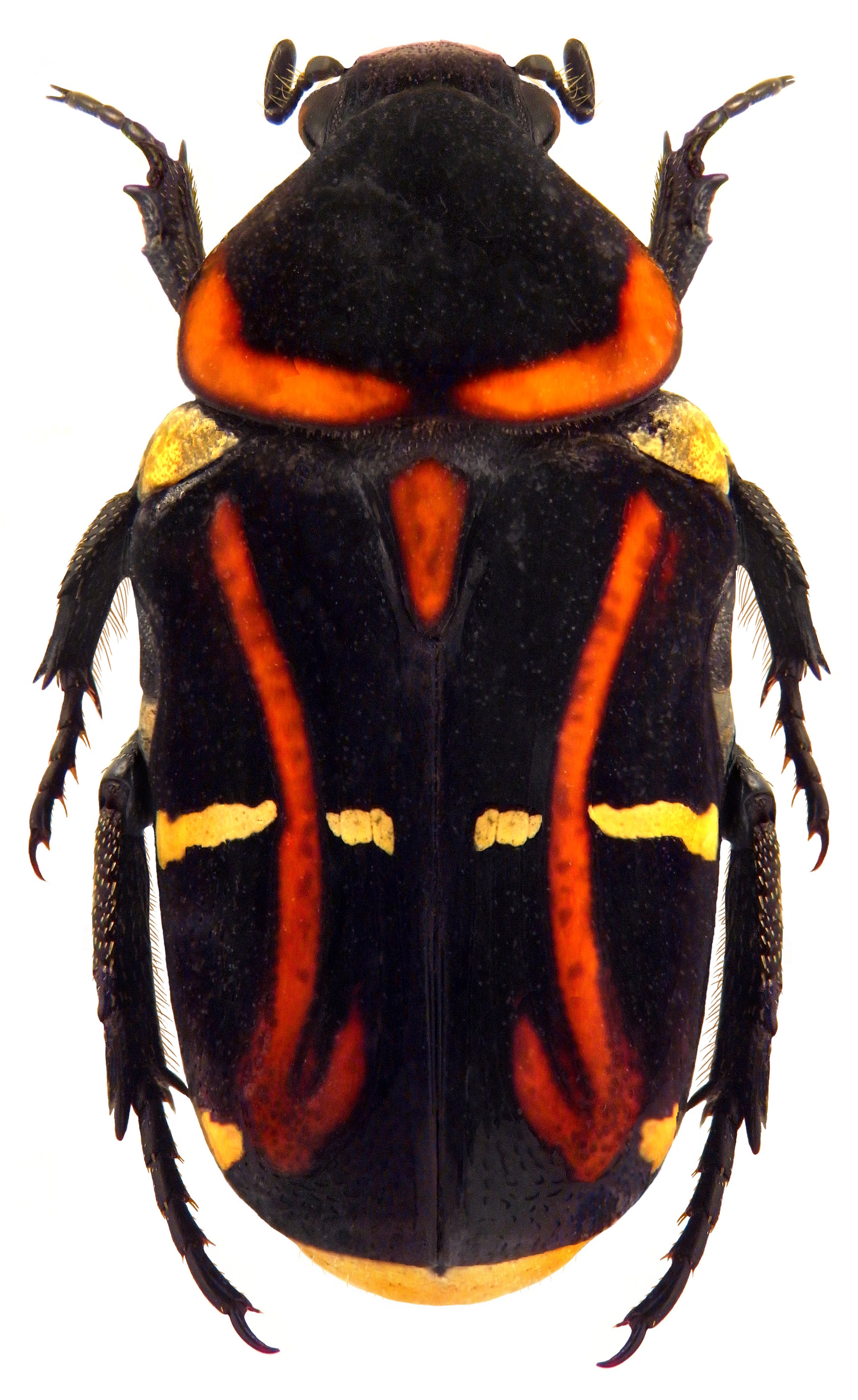 Familie: Scarabaeidae Groesse: 13-15 mm Fundort: Indonesien, Sulawesi, Airmadidi, Mt. Klabat, 380 m leg. det. A.Skale, 2009 Photo: U.Schmidt, 2010